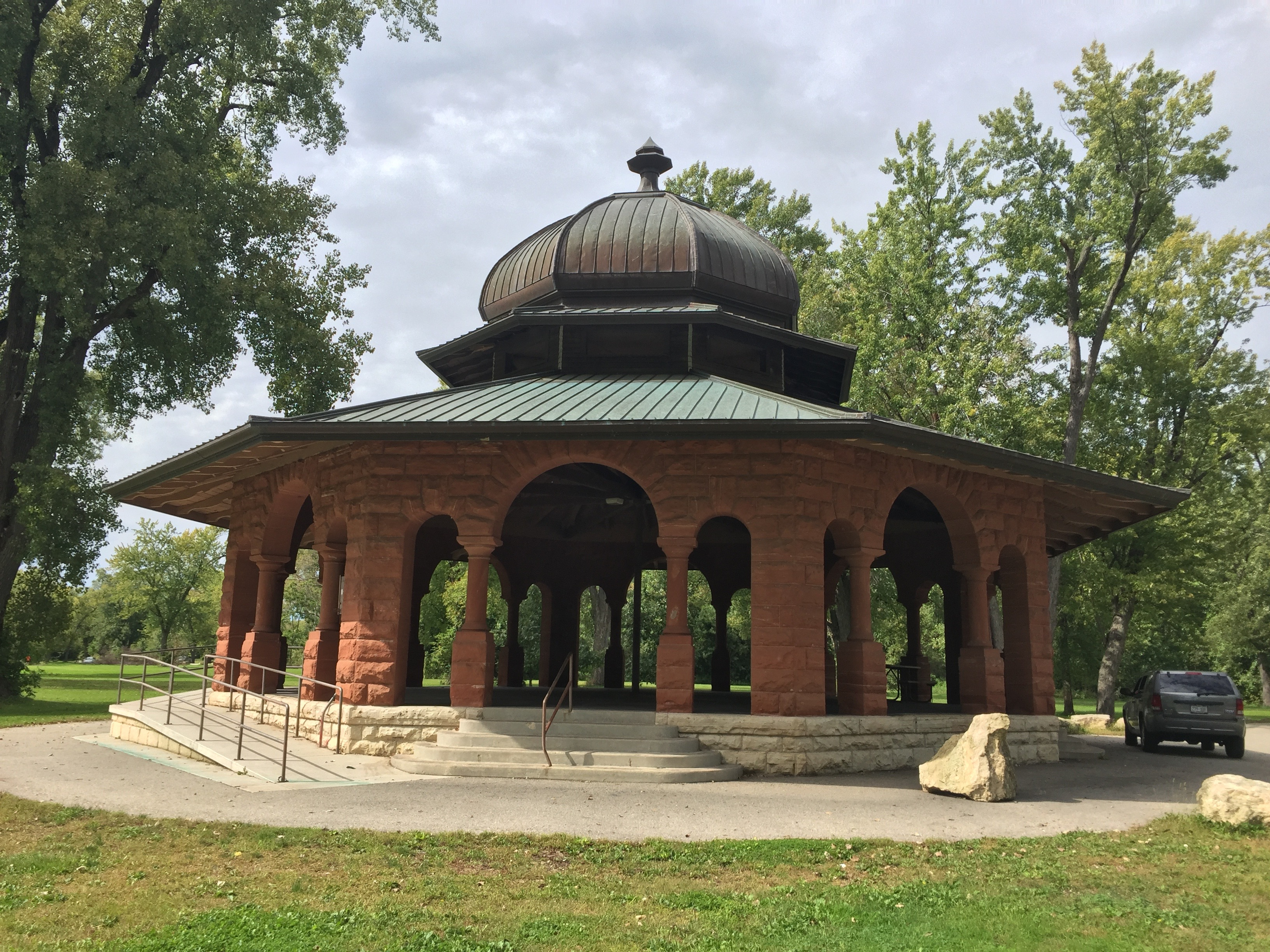 Pettibone_Park_shelter